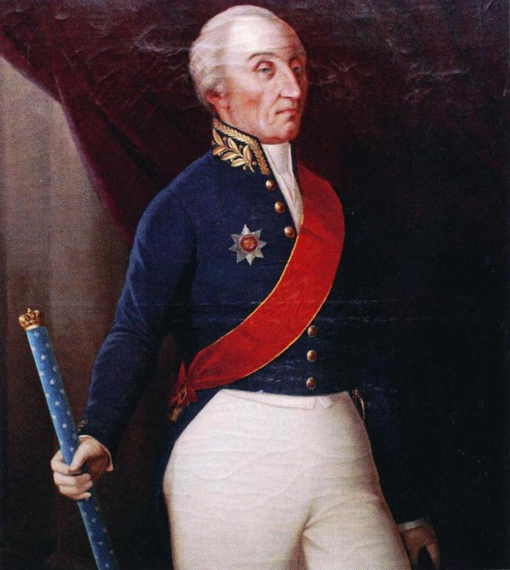 Robert Wilhelm De Geer (1750–1820) maamarsalkkana, postuumi muotokuva vuodelta 1865. Omistaja Ritarihuone.